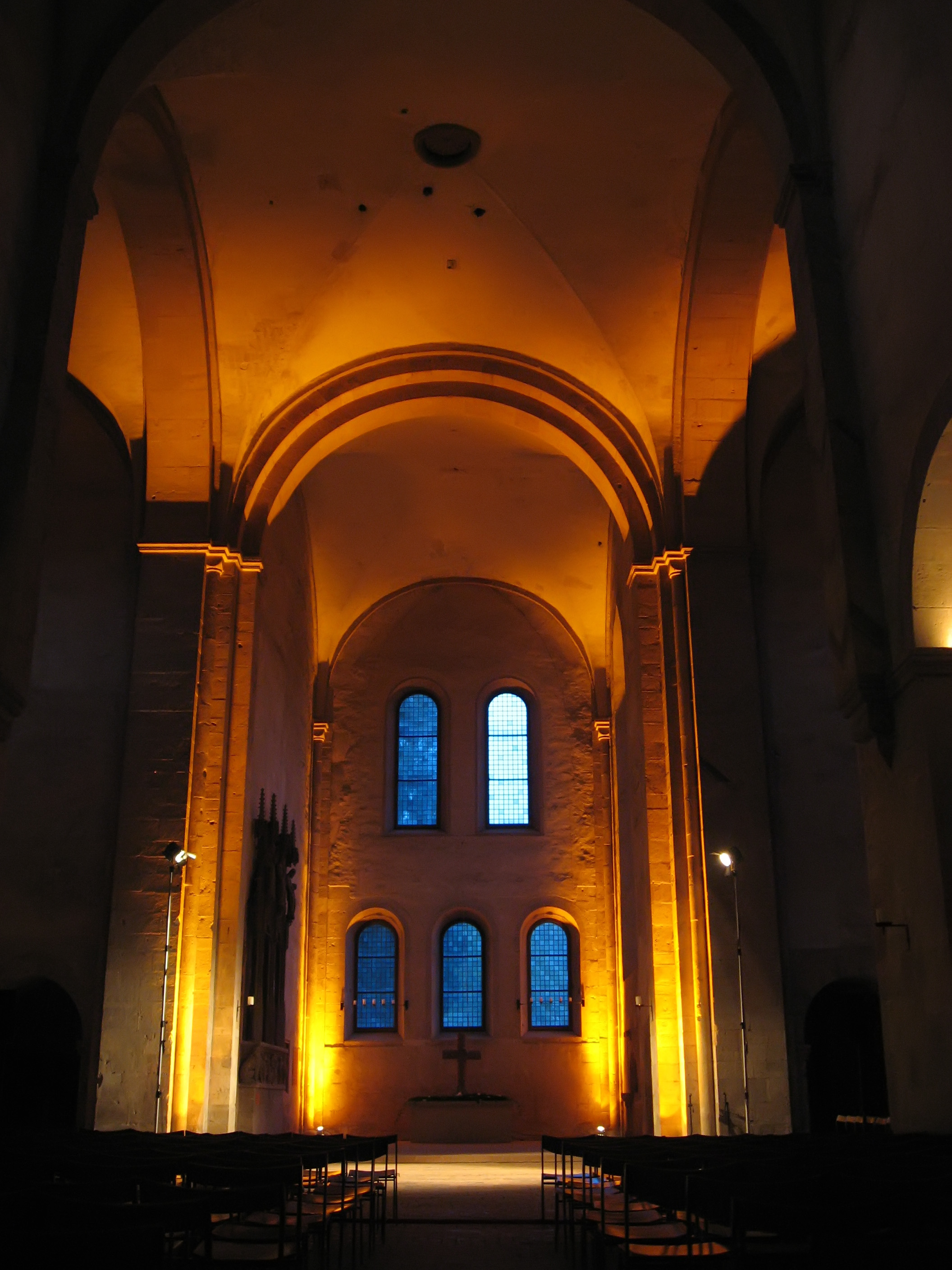 Description: Germany Eltville Monasteries Zisterzienser Kloster Eberbach Basilika Date: 2007-09-21